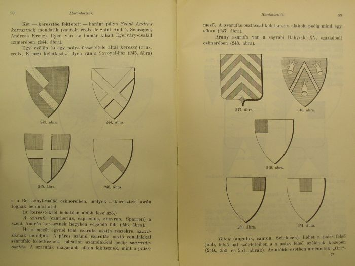 Une page du manuel d'héraldique de Bárczay Oszkár (in "heraldika kézikönyve")